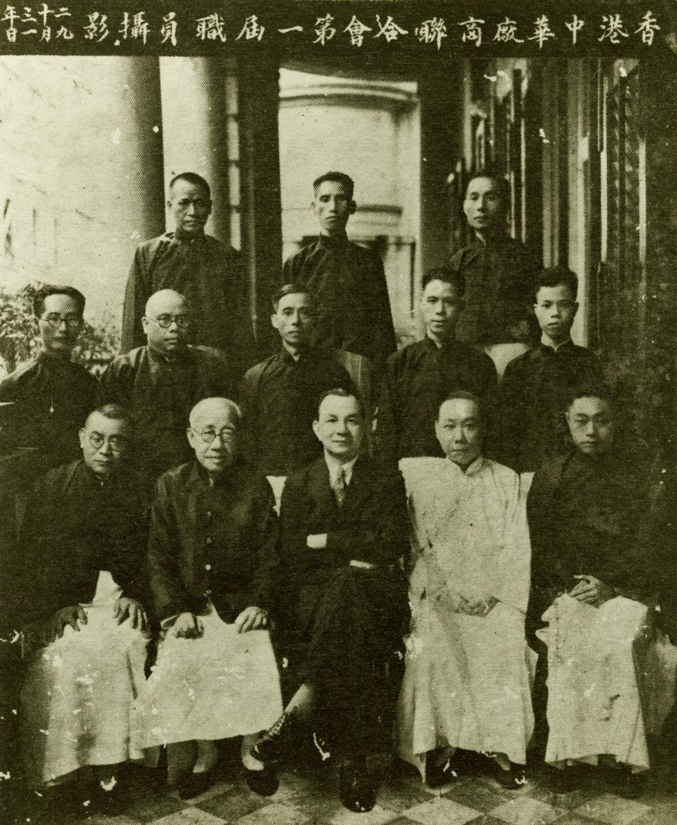 粵語: 民國二十三年九月一日（1934年9月1日）舉行成立大會，由葉蘭泉出任大會主席。